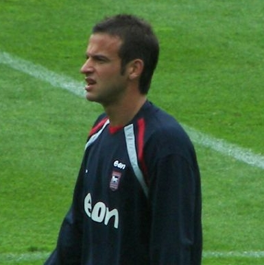 Sito Castro